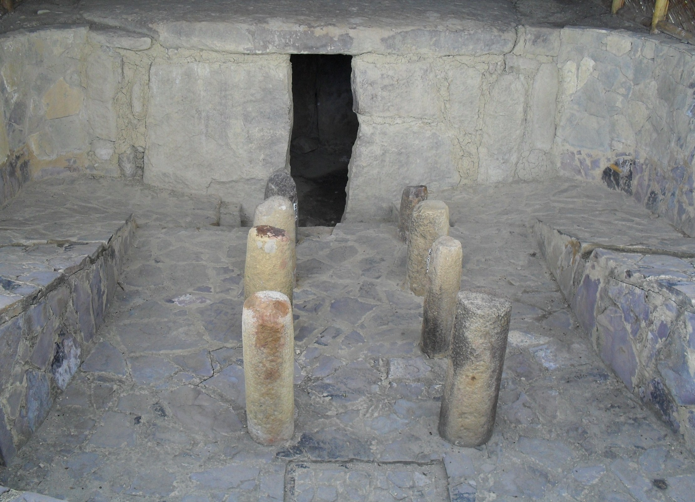 Tumba dolménica, en el Parque Arqueológico de Monquirá (Infiernito), en inmediaciones a Villa de Leyva, Boyacá, Colombia